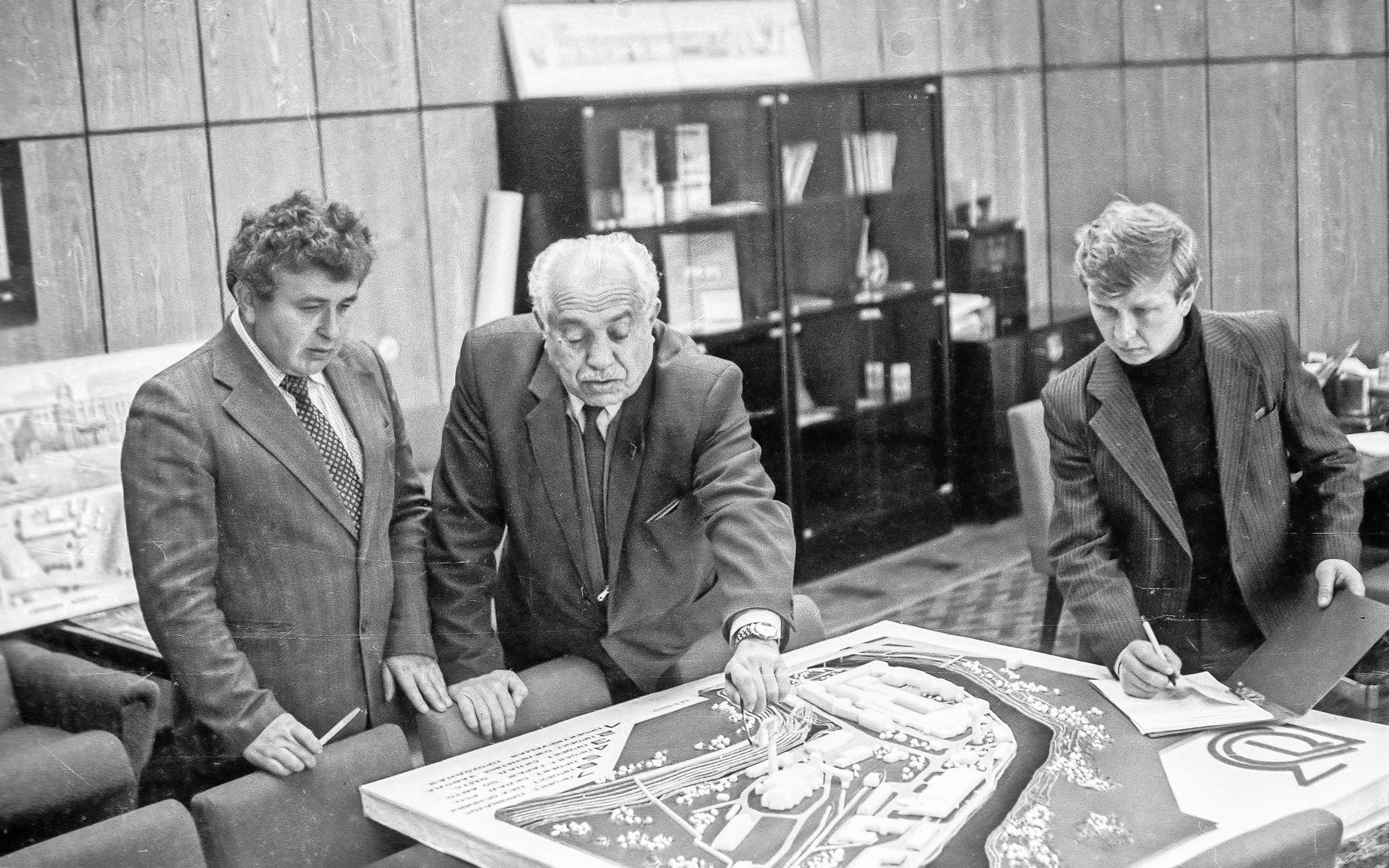 В кабинете директора Переславского опытного завода ГОСНИИхимфотопроекта идёт обсуждение планов застройки завода. (Так завод назывался с 01.04.1979 по 01.02.1990.) На макете видны полосатые переславские валы и тёмная река Трубеж. Слева Алексей Иванович Соловьёв, начальник проектно-конструкторского бюро (†11.04.2010). В центре директор завода Николай Гершович Ушомирский (10.04.1923—23.06.1987). Справа Александр Сергеевич Киселёв, инженер-конструктор строительной службы завода.